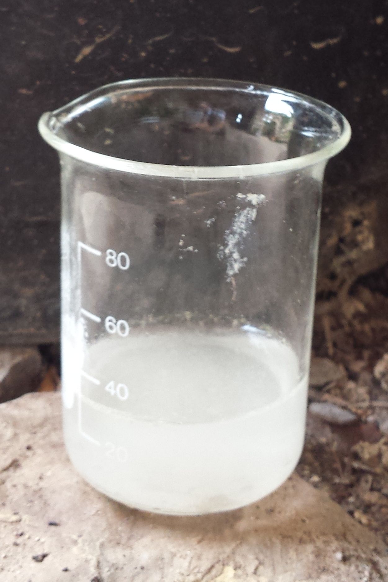 Pluja de fang del 12 d'agost de 2015 a la Serra de Castelltallat, Bages